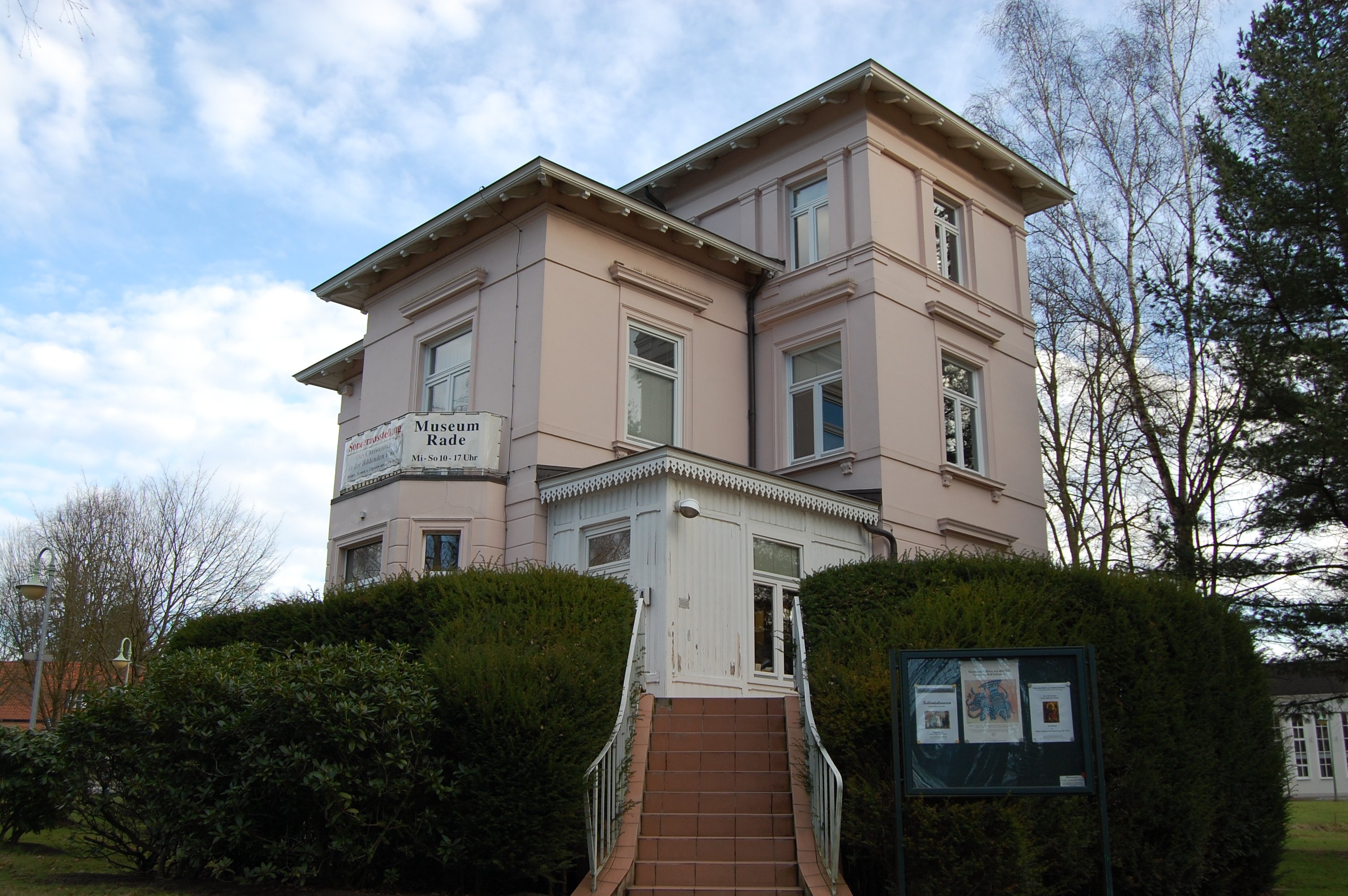 Museum Rade in Reinbek Object location53° 30′ 25.59″ N, 10° 15′ 06.19″ E